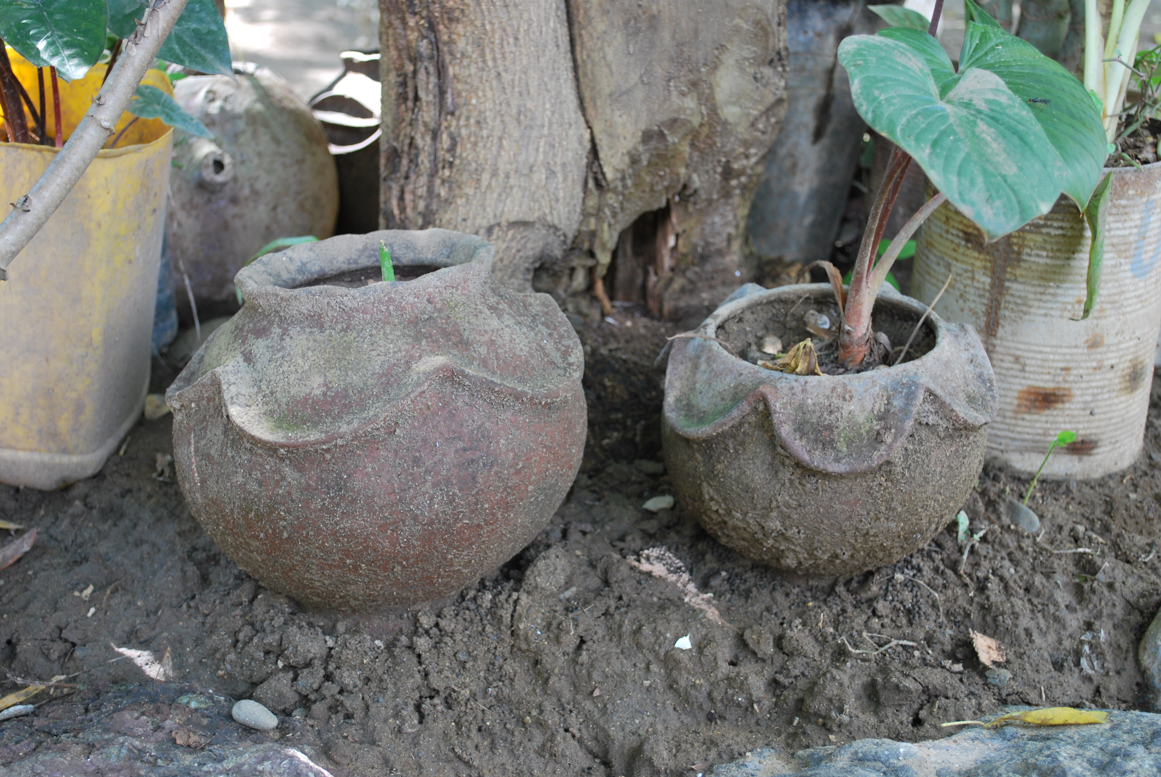 Taknebo, Lelaufe, Oecusse